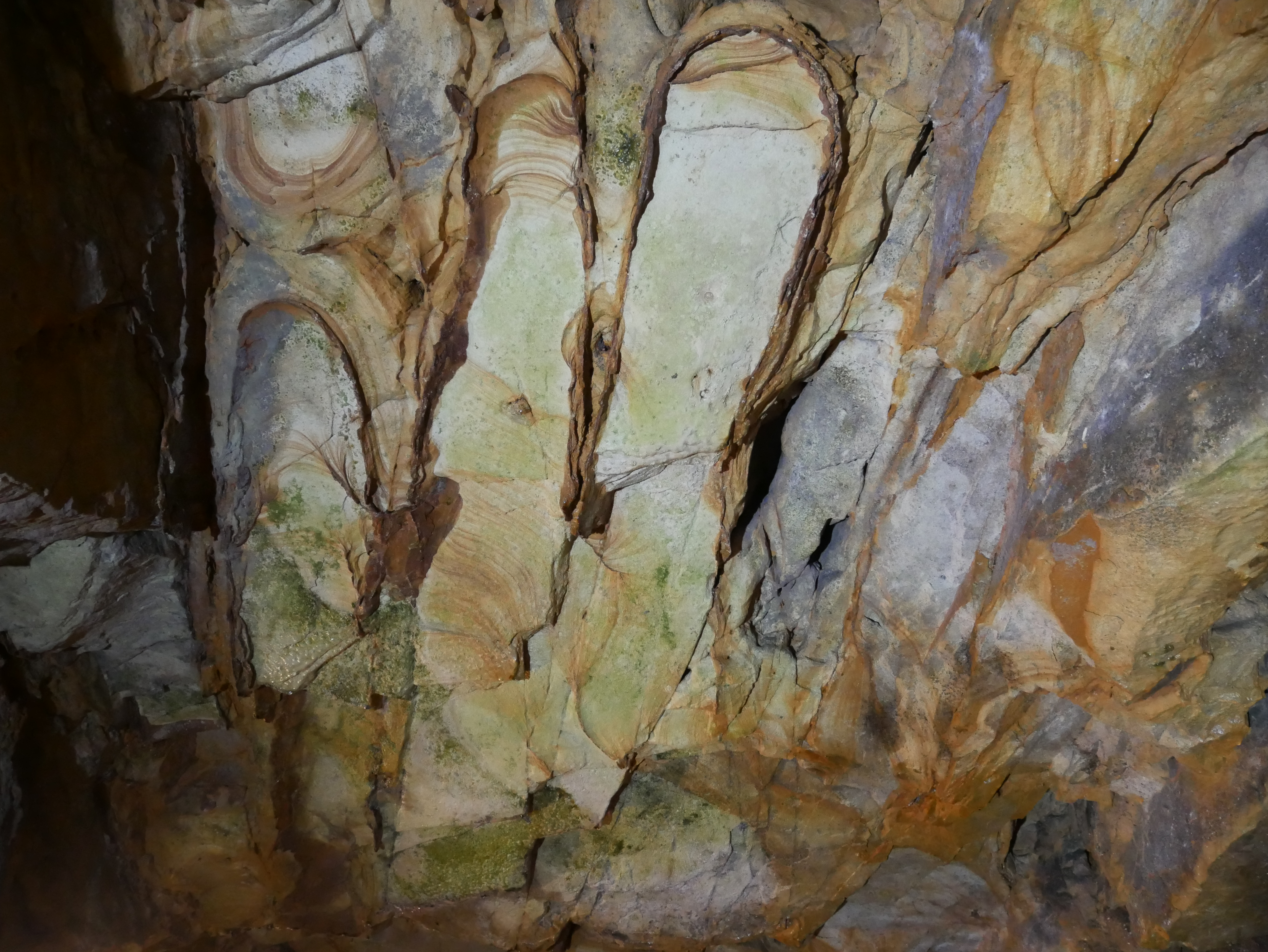 佛手洞佛手，基隆市中山區仙洞里